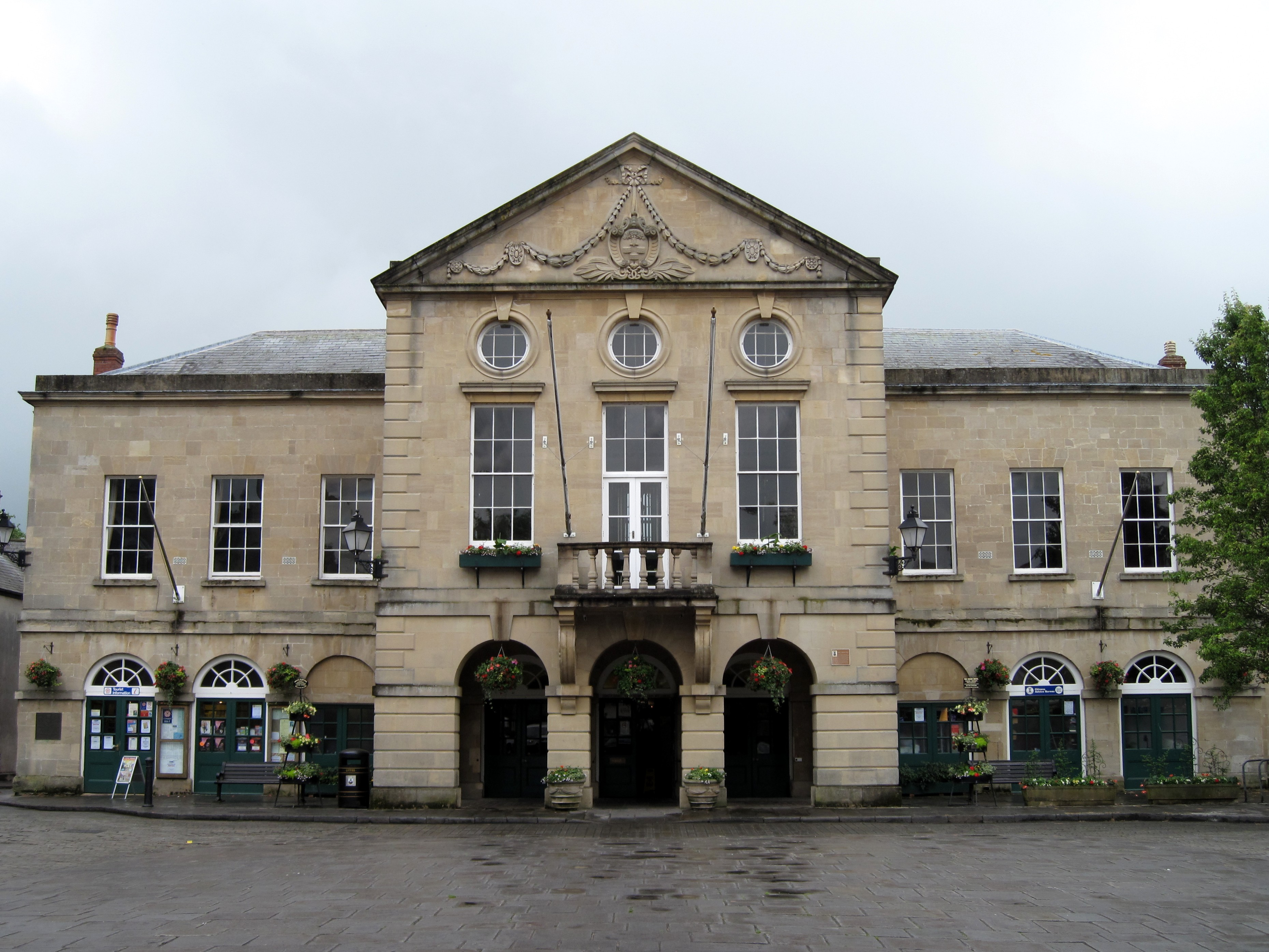 Rathaus von Wells, England